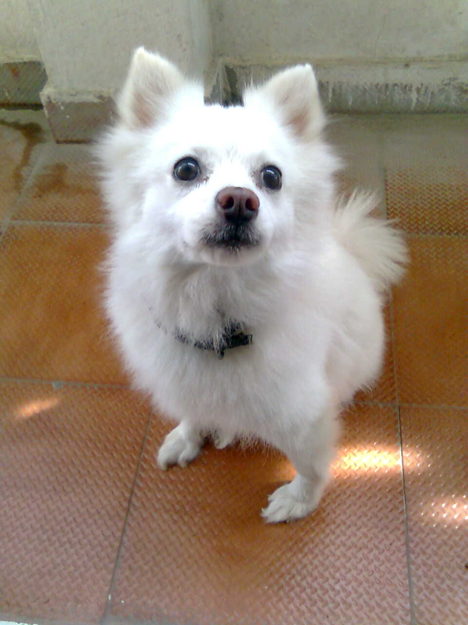 வெள்ளை பொமரேனியன் நாய்